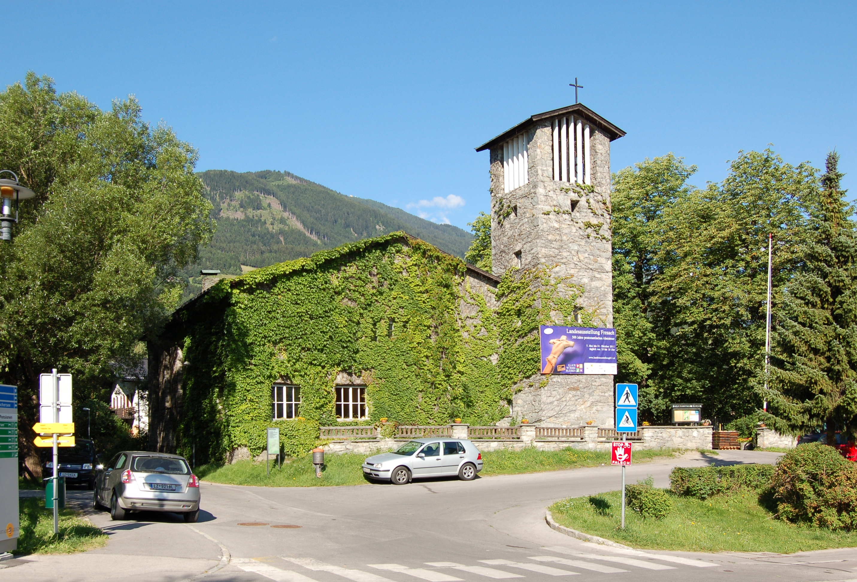 Die denkmalgeschützte, evangelische Martin-Luther-Kirche in Lienz (Amlacher Straße 14).